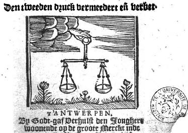 Detail van de titelpagina van de "Konstighe Refereynen" van Anna Bijns (1493-1575), heruitgegeven door Godt-gaf Verhulst in Antwerpen in 1668